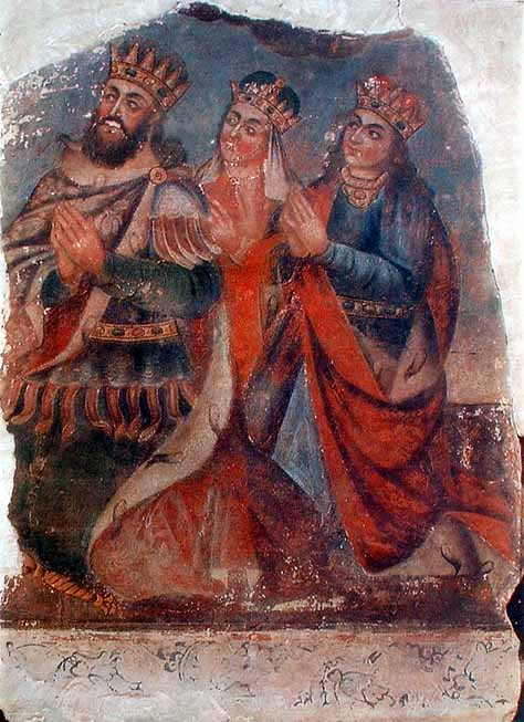 Царь Трад с женой Ашхен и сестрой Хосровадухт